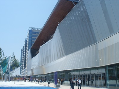 Imagen del Centro de Convenciones Internacional de Barcelona. Imagen tomada por PauBu el 14 de mayo de 2004. Publicada bajo licencia GNU FDL.